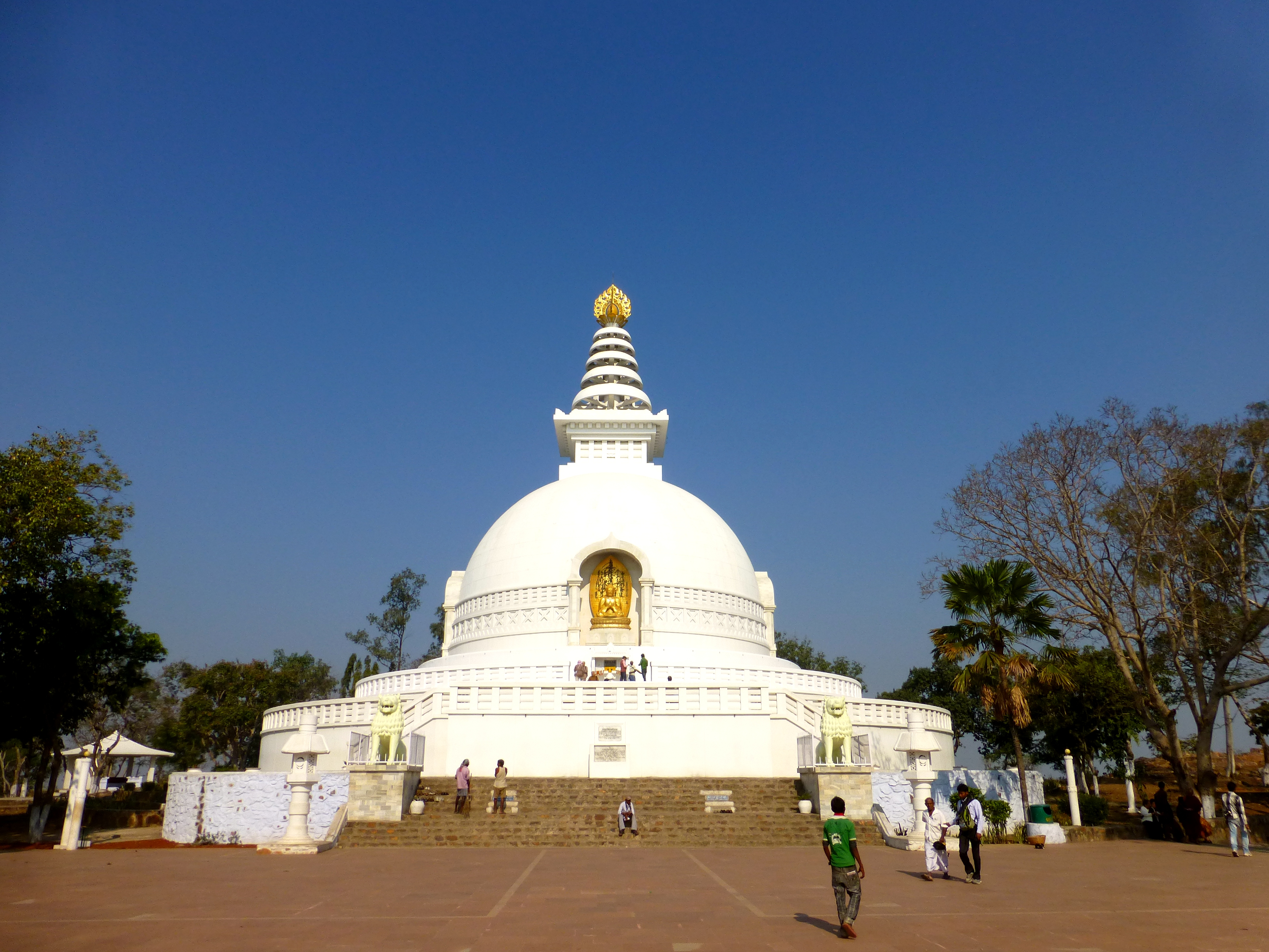 Shanti Stupa at Rajgir.